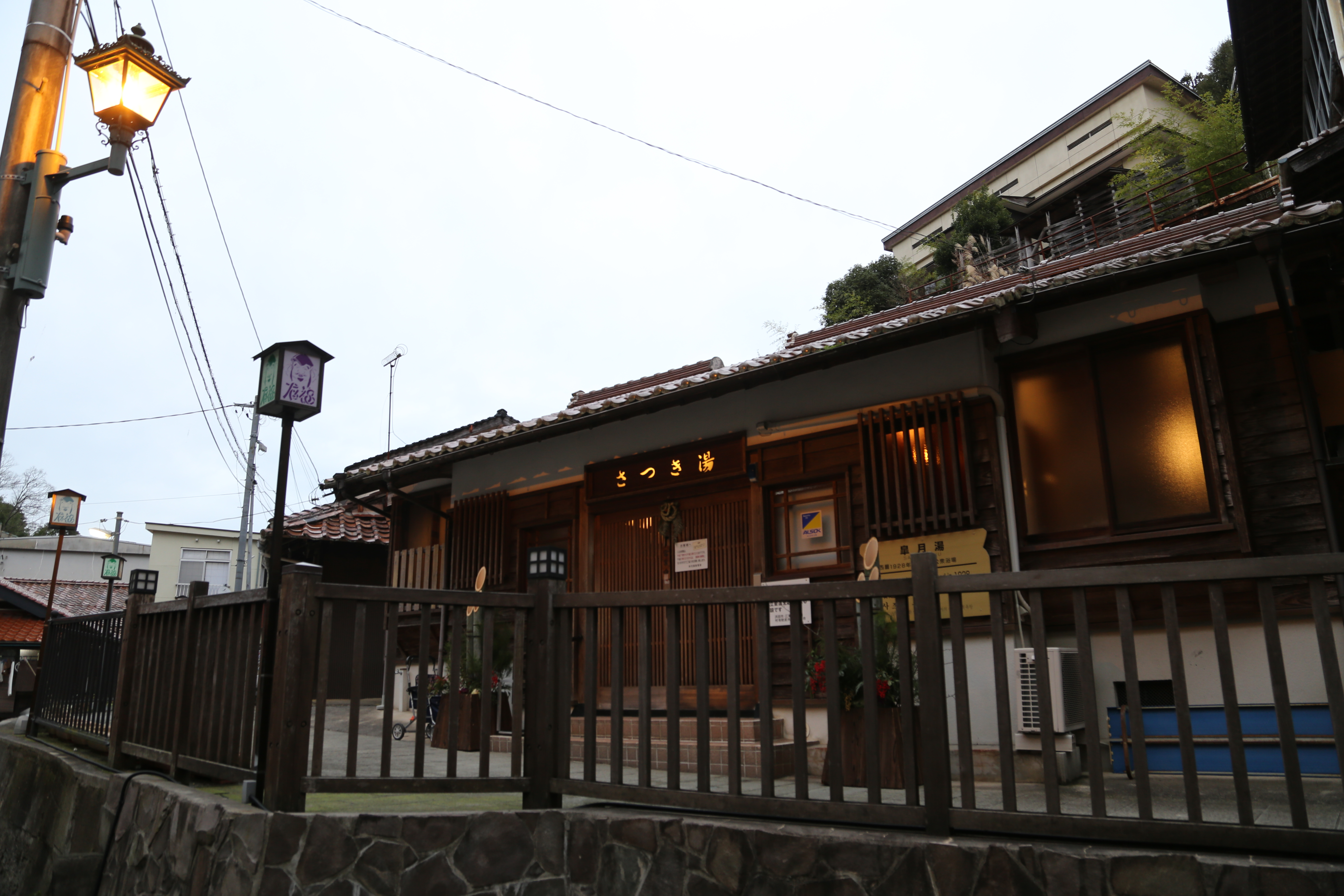 有福温泉のさつき湯